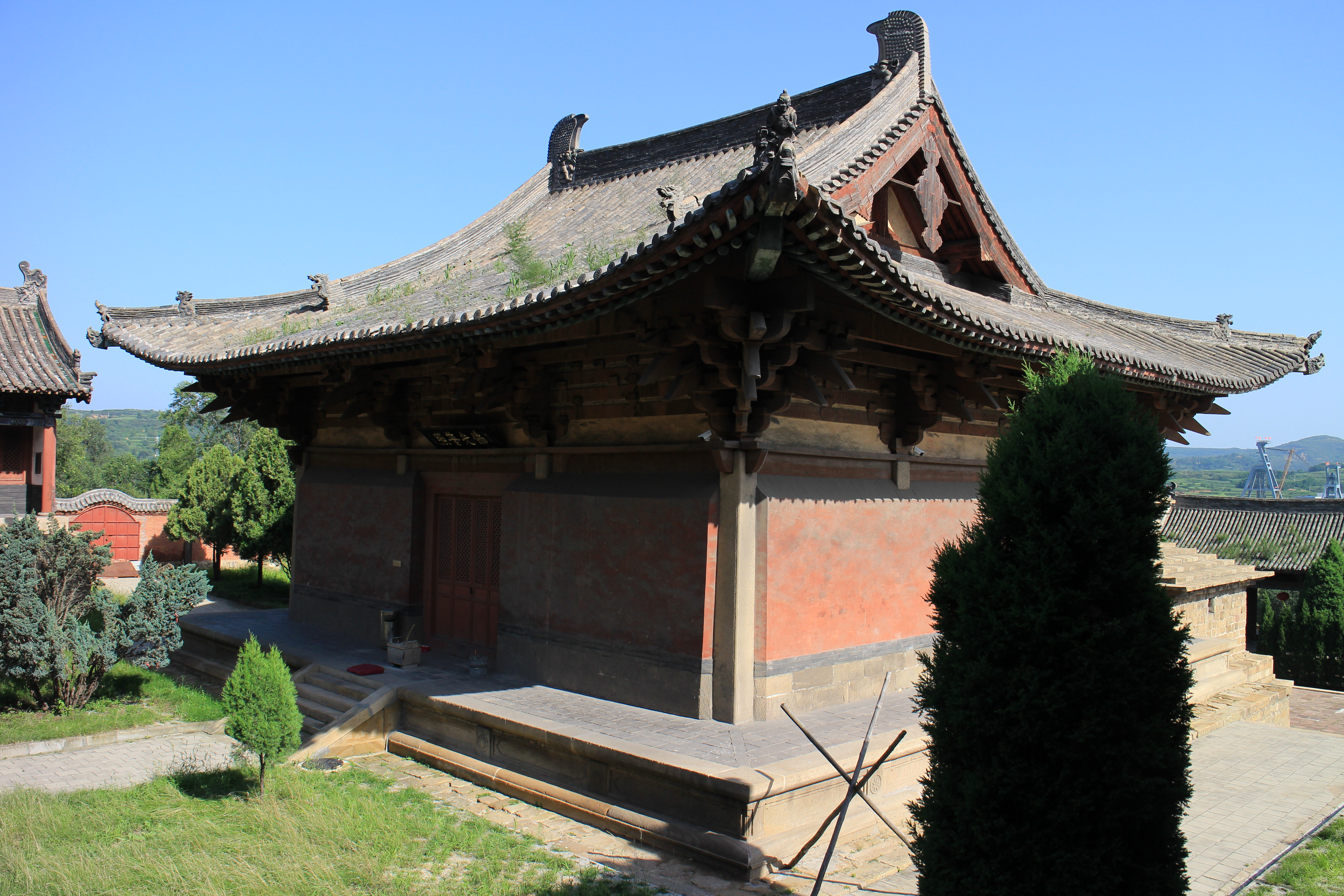 长子法兴寺圆觉殿